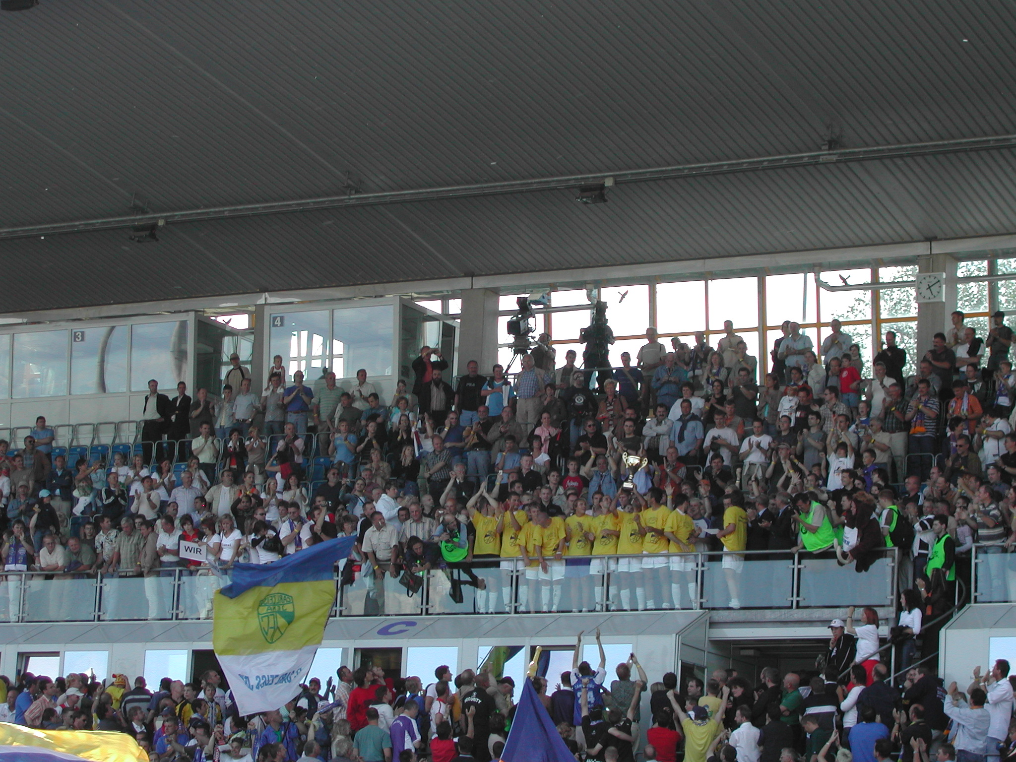 Nach dem Aufstiegsspiel 2005 gegen MSV Neuruppin. FC Carl-Zeiss-Jena hat den Aufstieg in die Regionalliga gesichert. Die Mannschaft erhält den Siegerpokal zum Gewinn der Oberliga Nordost.